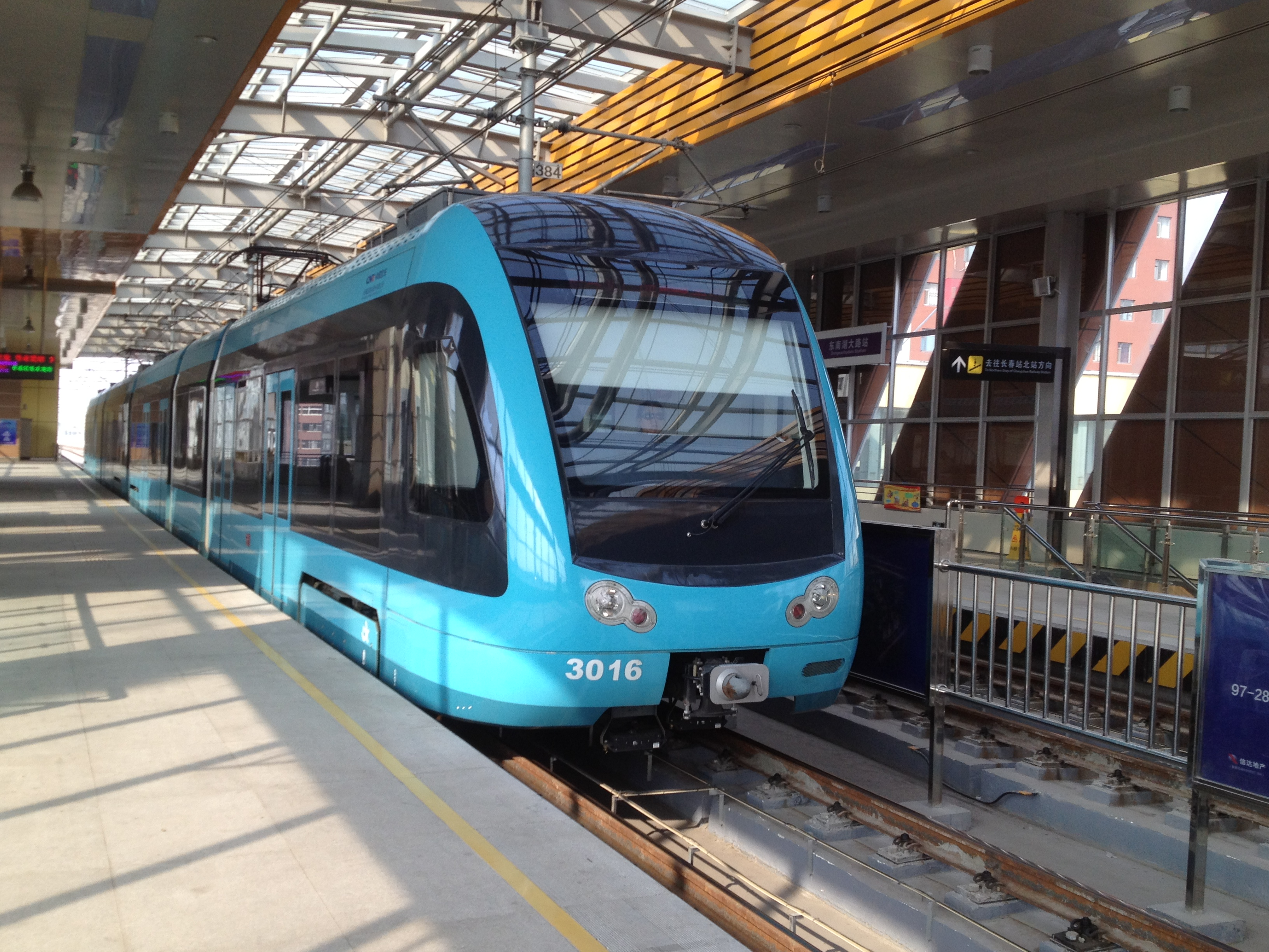 长春轻轨4号线